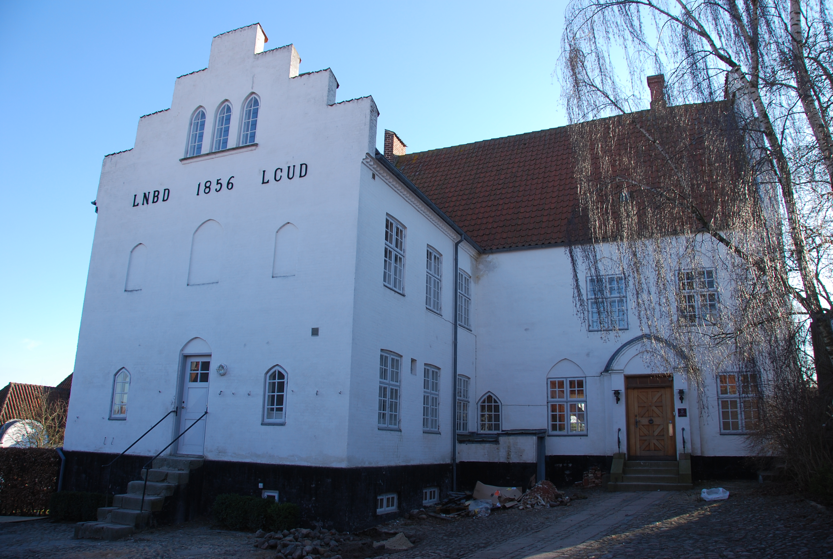 Den fredede bygning "Stiftsprovstegården" i Viborg